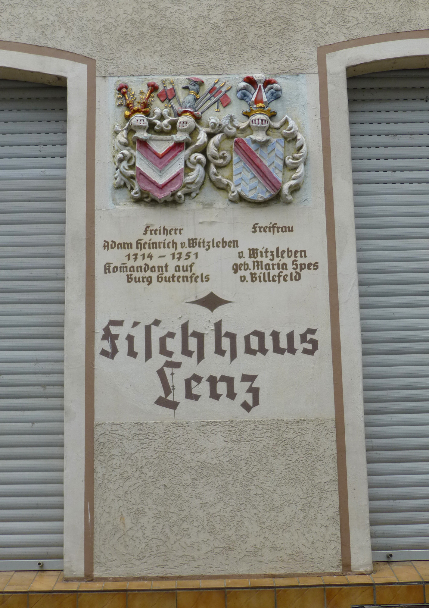 Wappenschilde des Kommandants der Burg Gutenfels, Adam von Witzleben, 1714-1751 und seiner Frau an einem Fischgeschäft in Kaub. Der Schild des Ehemanns ist von Silber und Rot dreimal gestürzt gesparrt. Der Wappenschild der Ehefrau Maria geb. Spes von Billefeld ist blau-silbern fünfmal gespalten und neunmal im Zickzackschnitt geteilt. Anstelle des Fischhauses stand hier einst der Freihof des Mainzer Domkapitels.